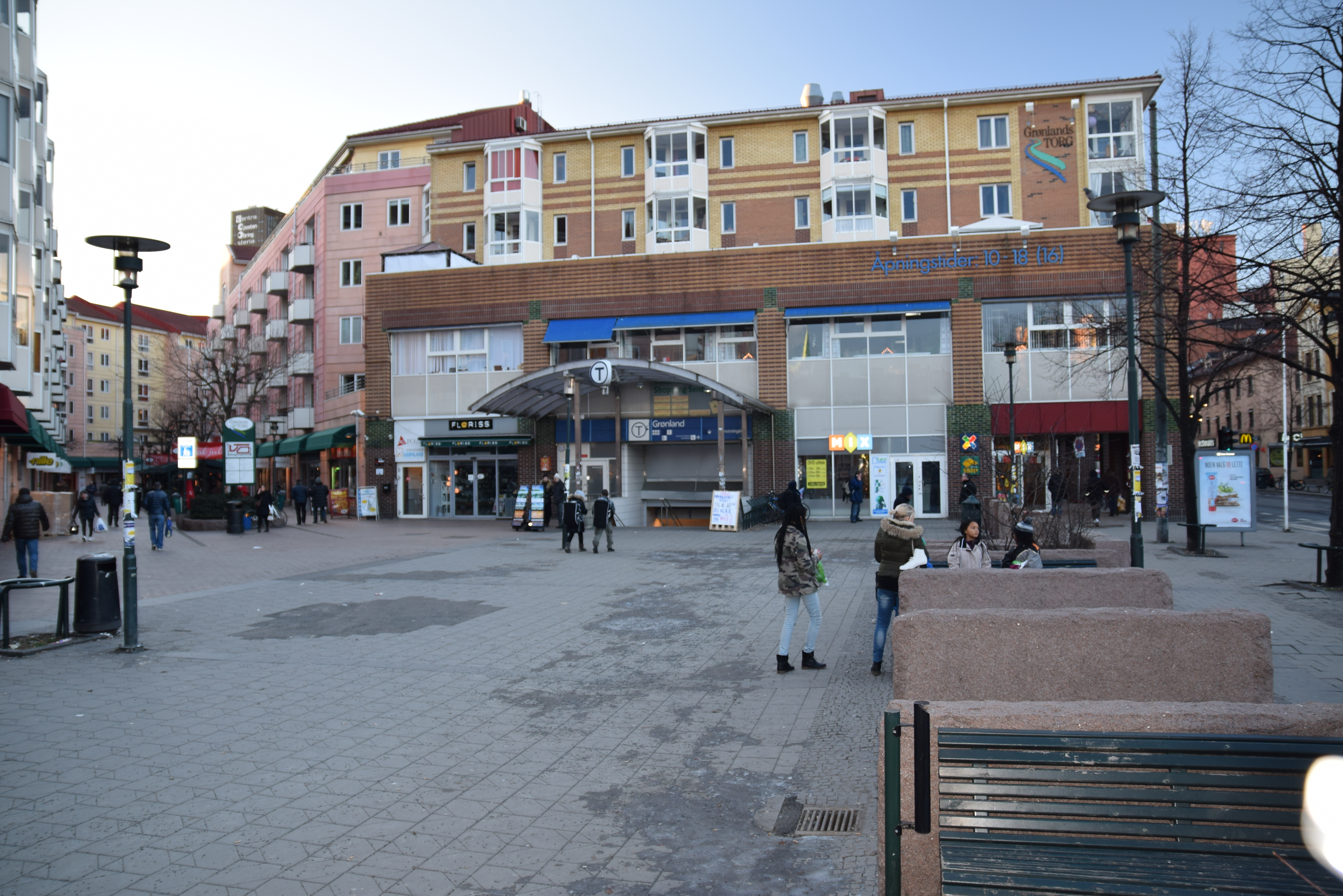 Grønlands torg, Grønland, Oslo, med nedgangen til Grønland T-banestasjon. Smalgangen til venstre.